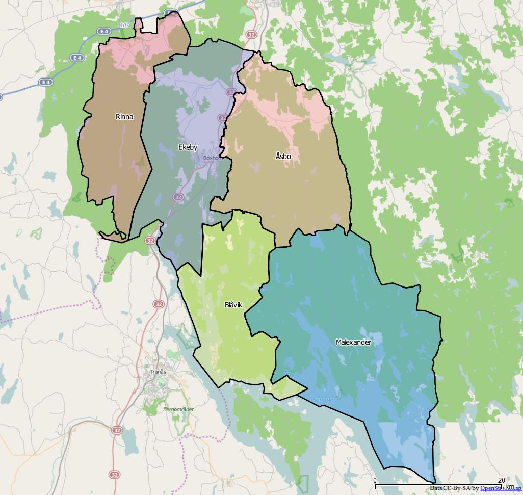 Distriktsindelningen i Boxholm kommun